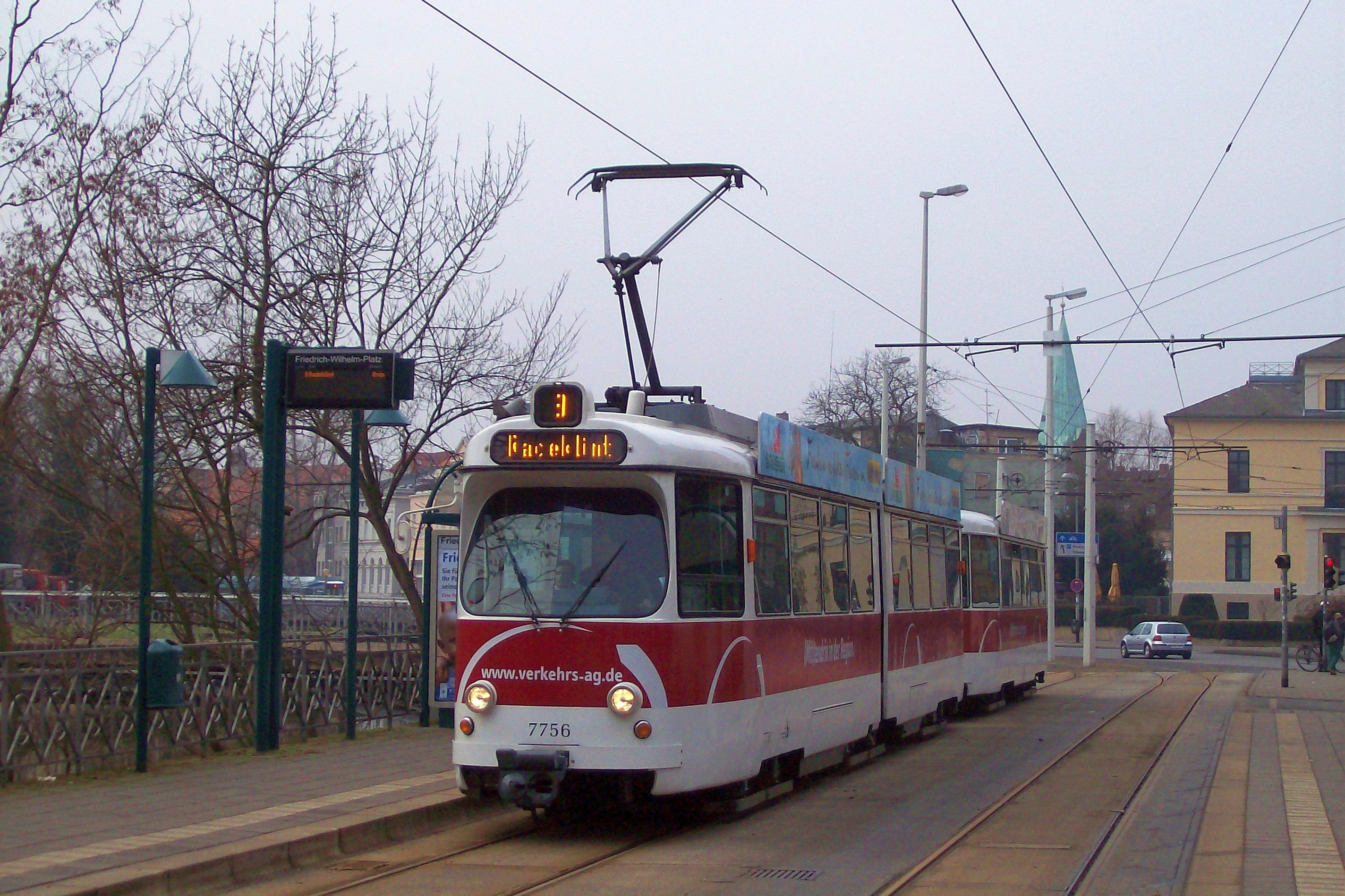 Braunschweiger Verkehrs-AG: GT 6 am Friedrich-Wilhelm-Platz